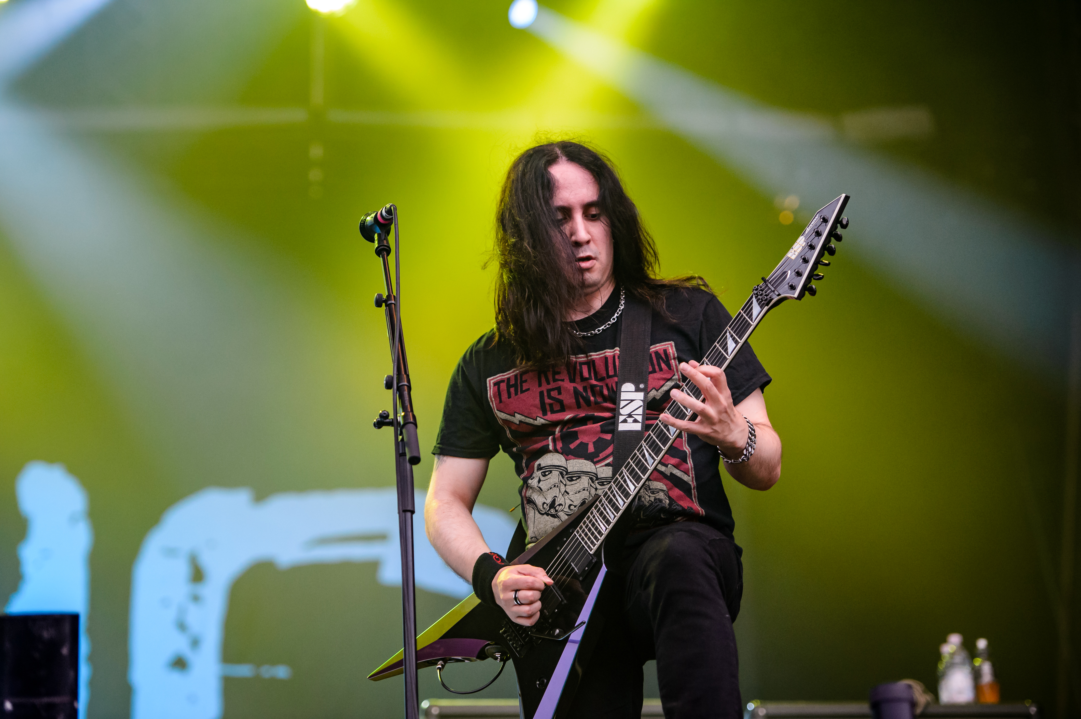 'RockHarz Open Air 2016; Ballenstedt': 'Children of Bodom'